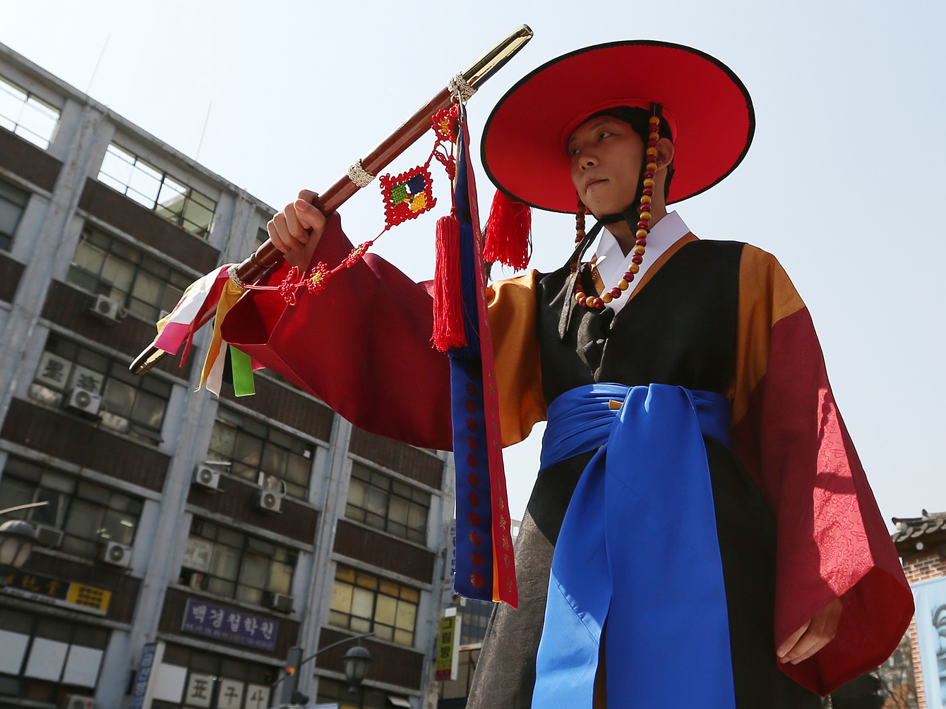 구군복 인사동 한복패션쇼